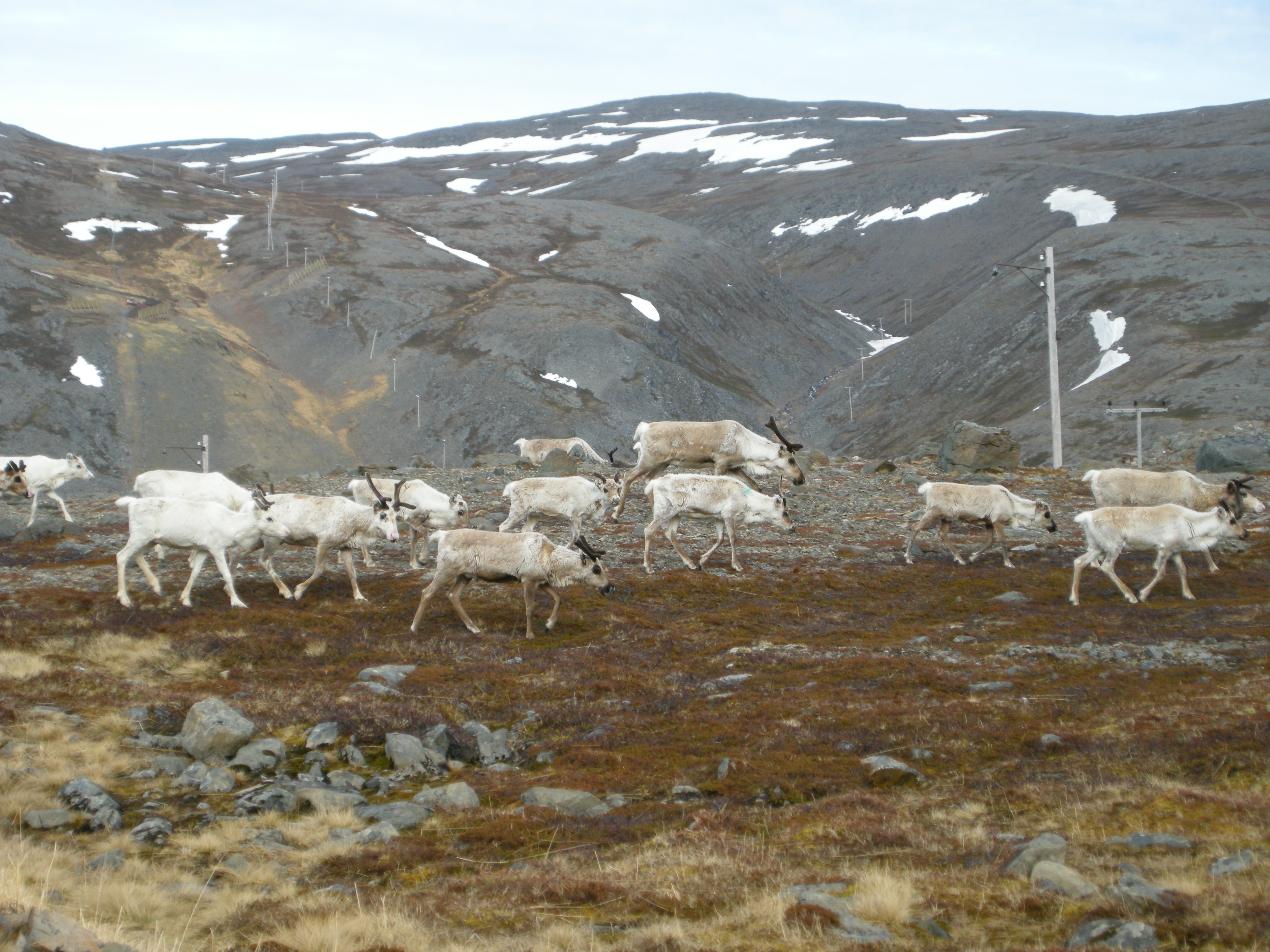 Tamrein på Magerøya, Nordkapp kommune